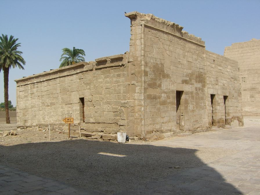 Vue d'ensemble des chapelles funéraires des divines adoratrices d'Amon à Médinet Habou - XXVe et XXVIe dynasties égyptiennes